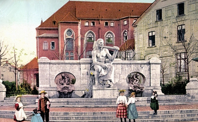 Jahrhundertbrunnen in Essen, erbaut 1907, heute unter Denkmalschutz